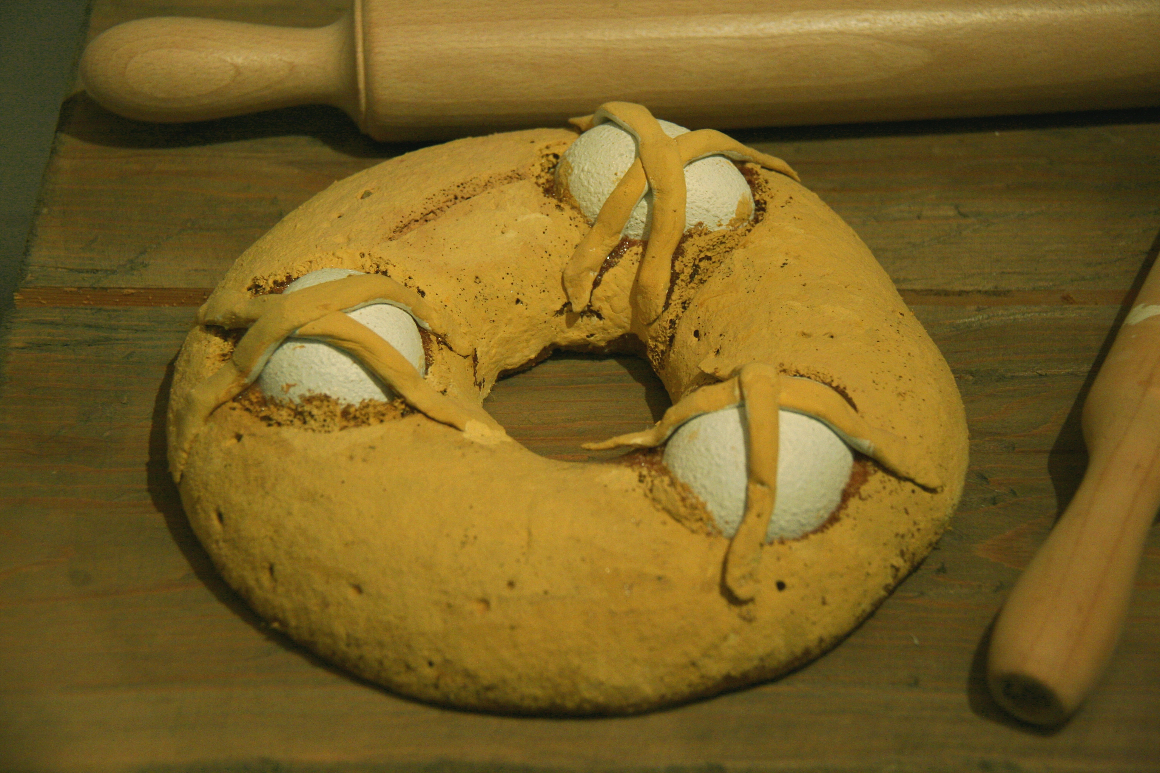 Mona de Pascua